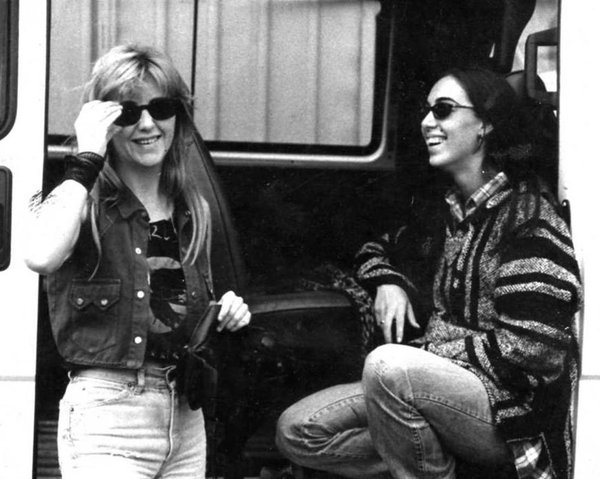 Las coristas de la banda Bombarderos, Estrella y Mónica. Foto tomada durante el trayecto al Festival Free Wheels de Francia en 1994.